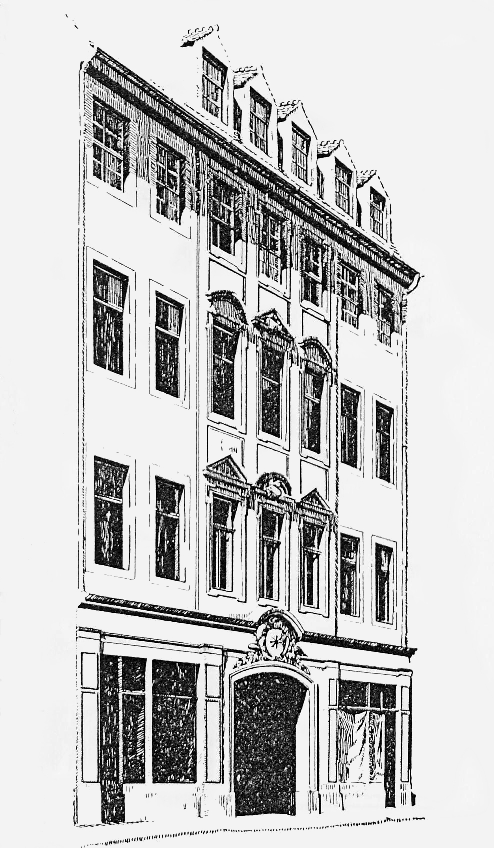 Zeichnung des Hauses Große Meißner Gasse / Straße 11 in Dresden (sog. Blauer Stern)